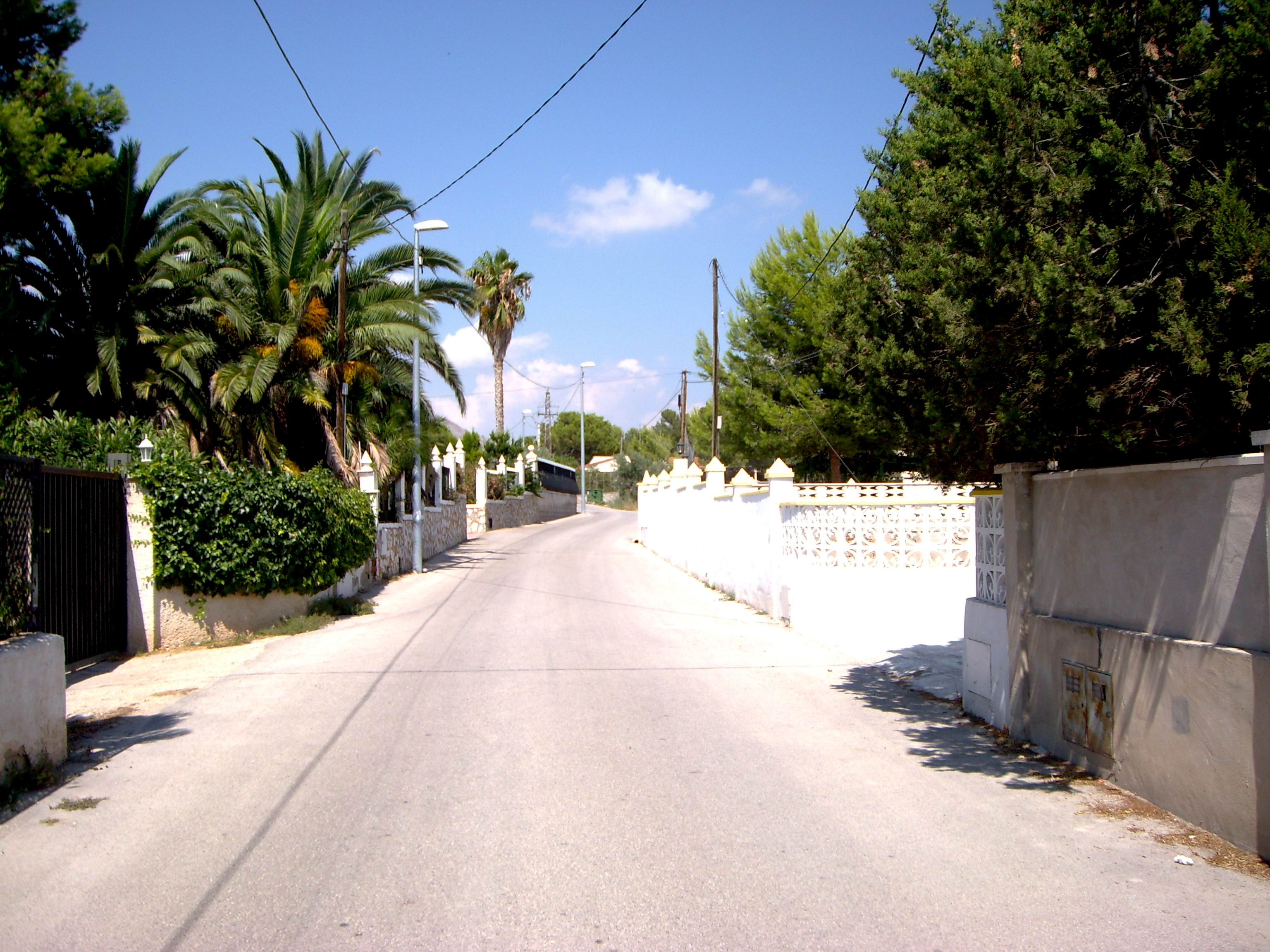 Camino Casa de los Dolores. Elda